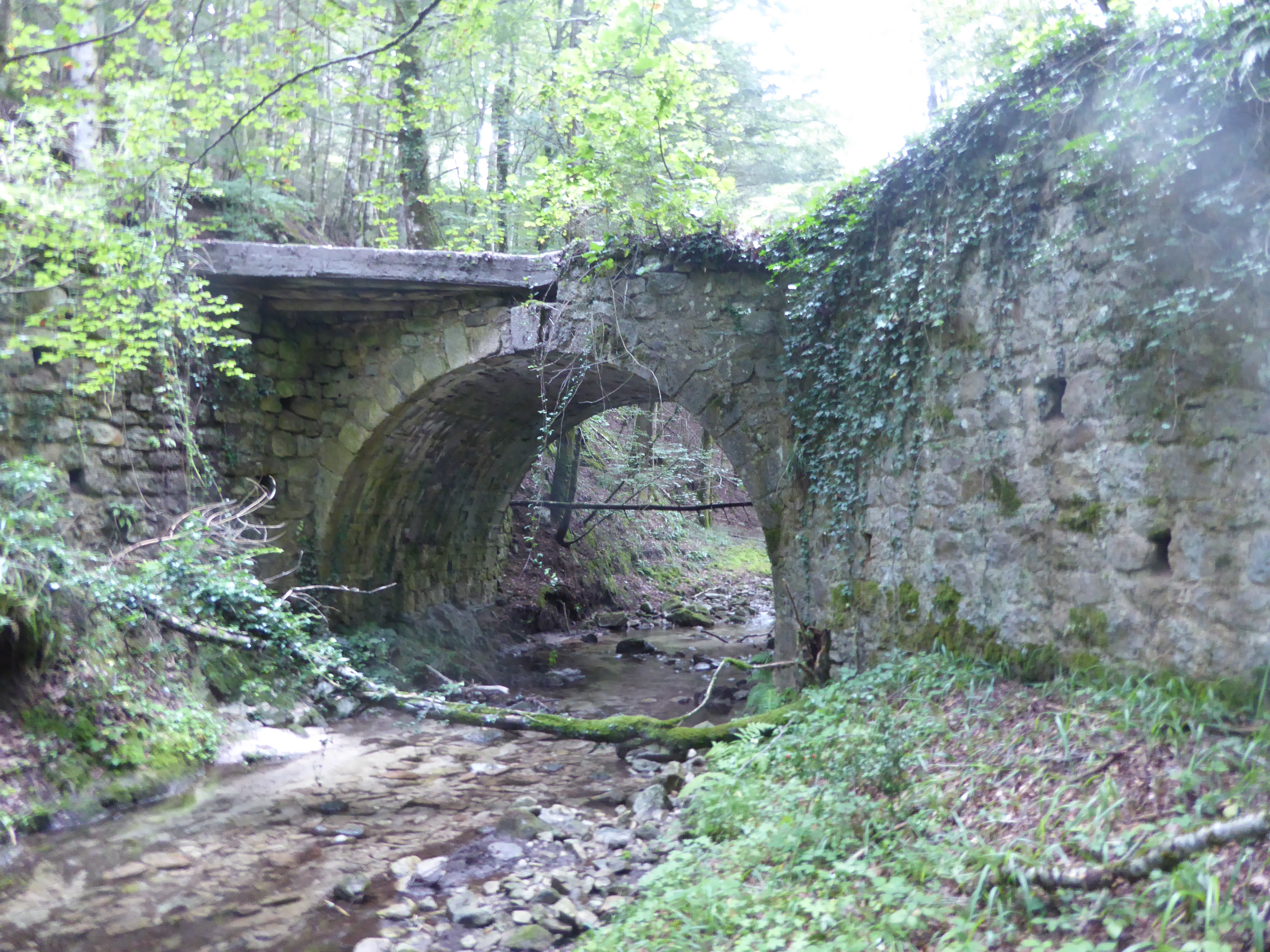 Ponte sul torrente Ruggero a Ferdinandea agosto 2018